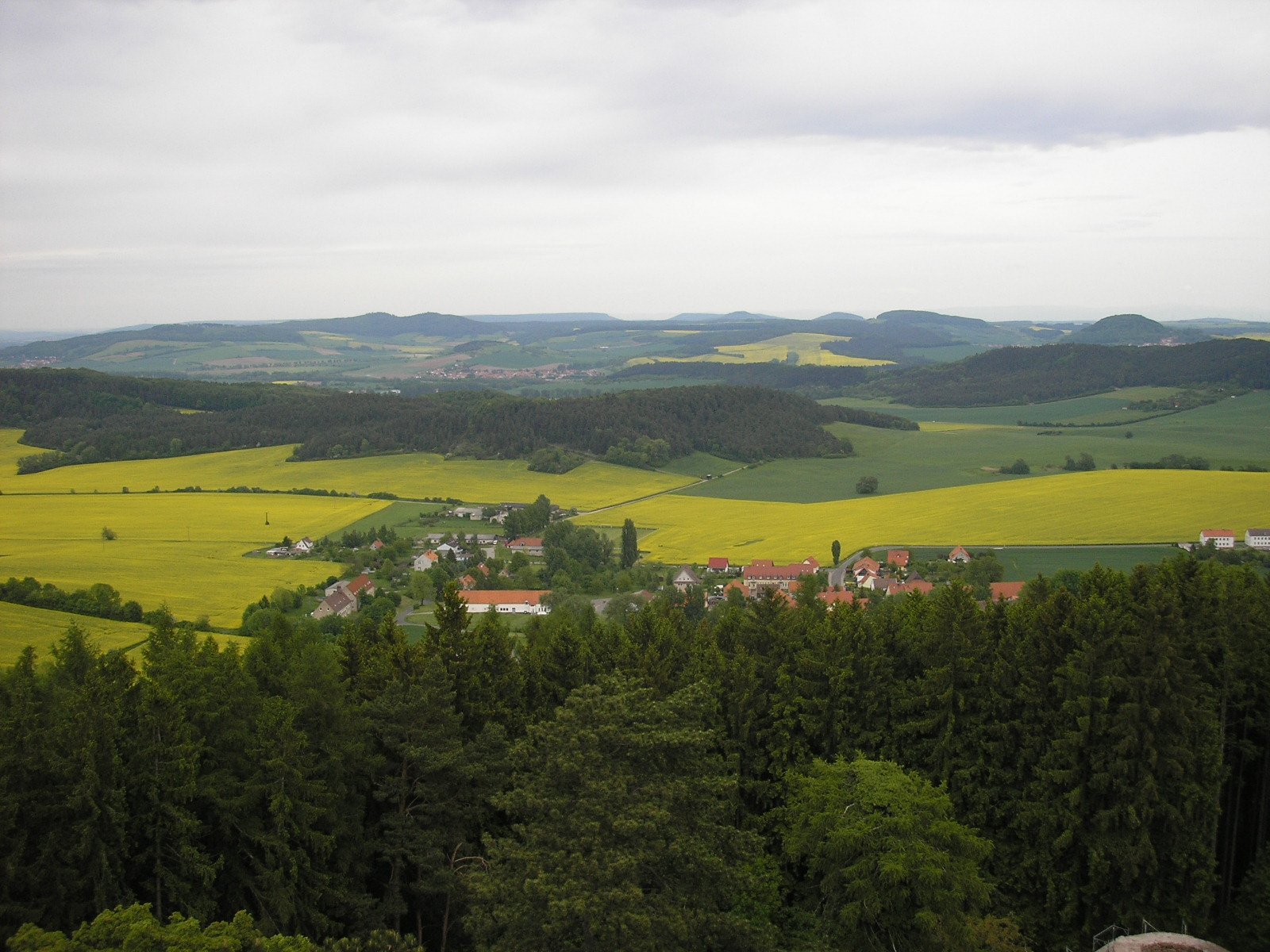 Blick vom Turm der Burg Hanstein über die Landschaft des westlichen Obereichsfelds (Thüringen) bis nach Südniedersachsen (im Vordergrund befindet sich Bornhagen, dahinter das Alte Holz und im Hintergrund der Reinhäuser Wald und rechts der Rusteberg).